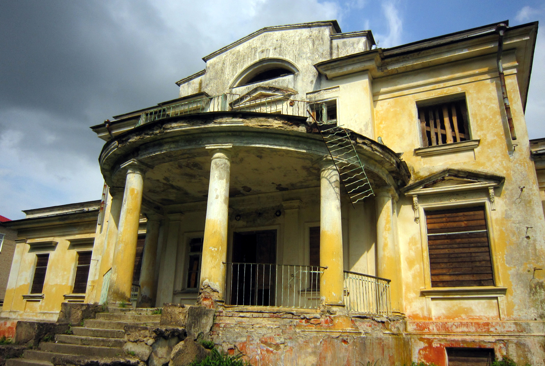 Беларуская (тарашкевіца): Комплекс былой сядзібы:палац і парк. в. Грудзінаўка This is a photo of Belarusian heritage monument. Reference number: 512Г000216 ( WLM)